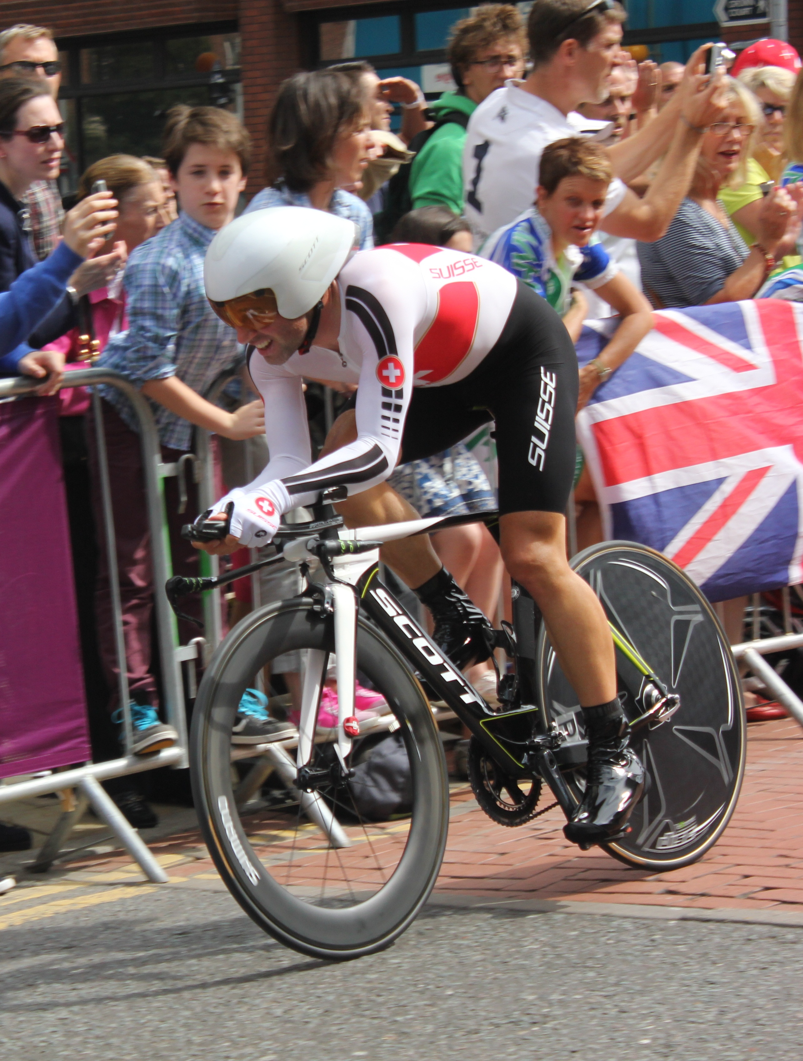 Le cycliste suisse Michael Albasini pendant le contre-la-montre des Jeux olympiques d'été de 2012